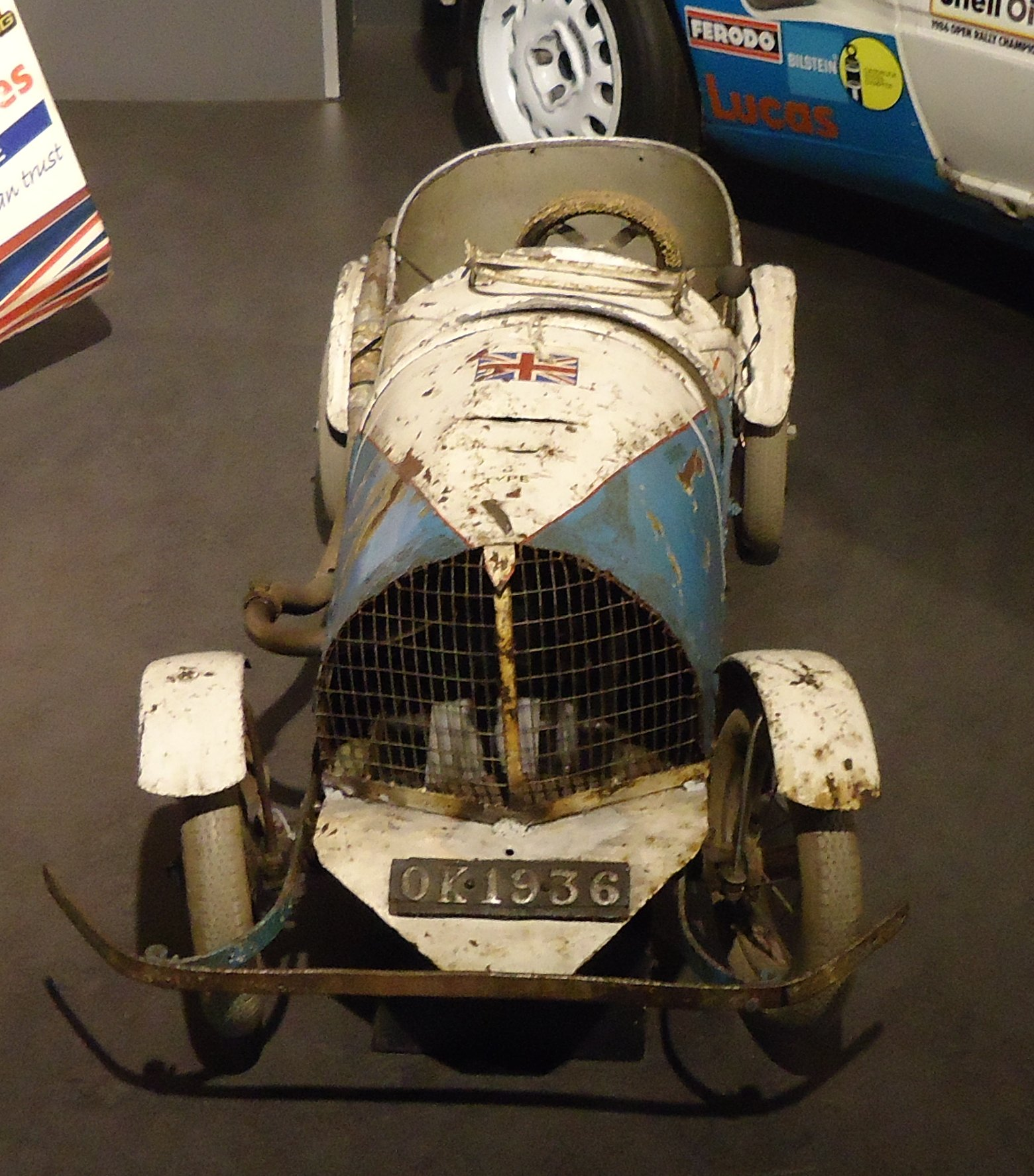 Museo del Transporte de Coventry